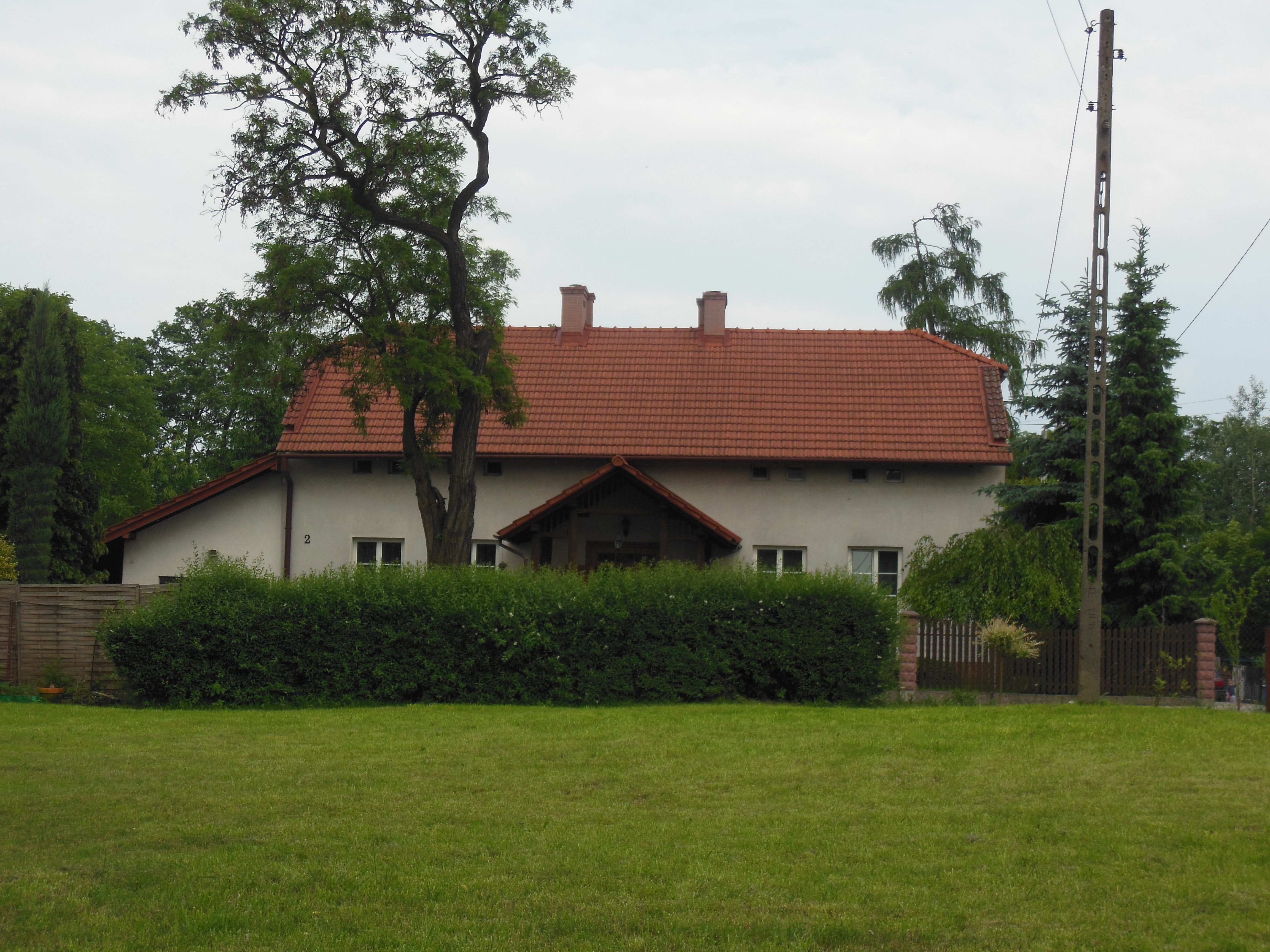 Dwór w Bieńczycach z początku XX wieku, Kraków.